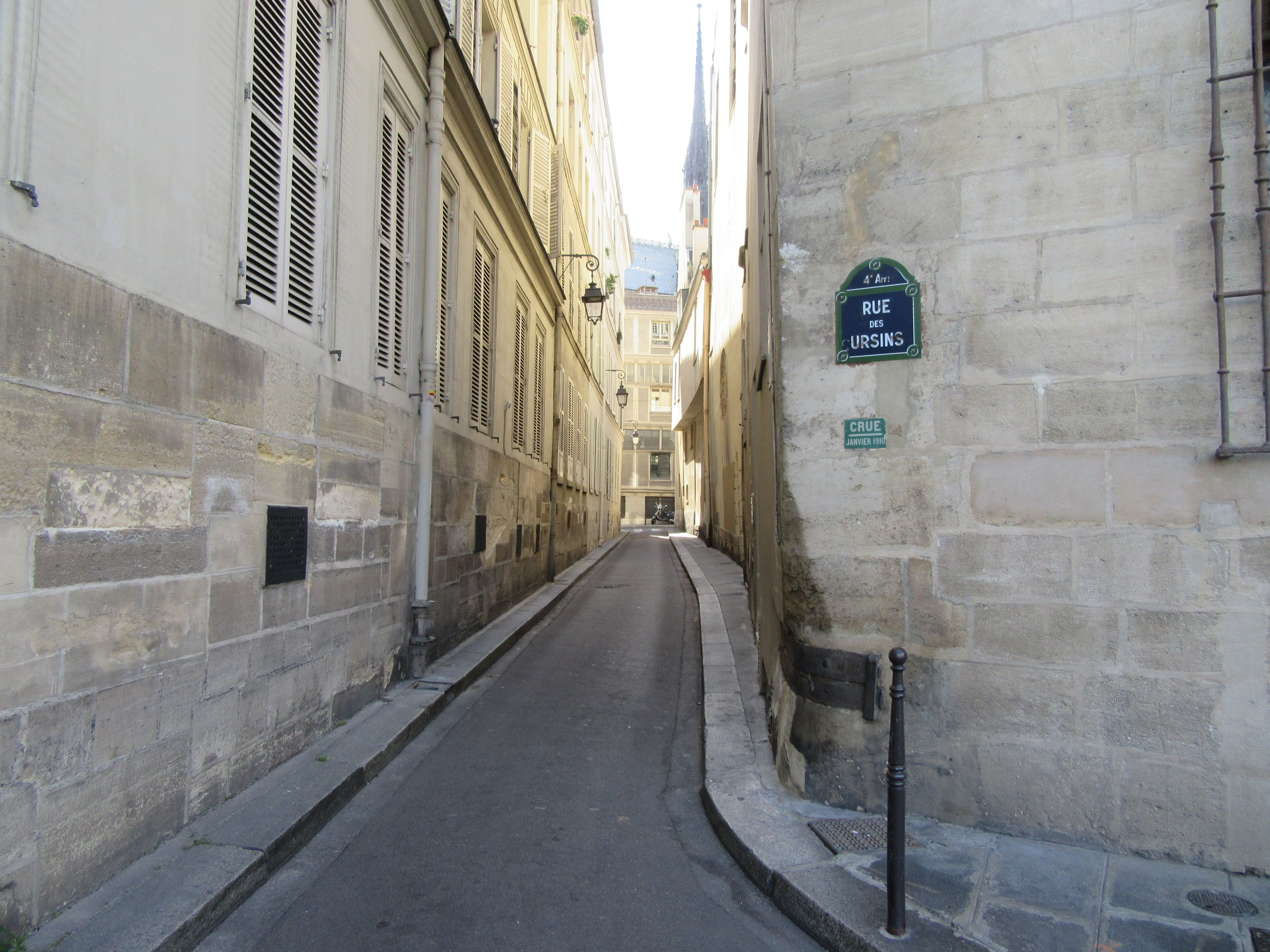 Rue des Chantres, Paris.